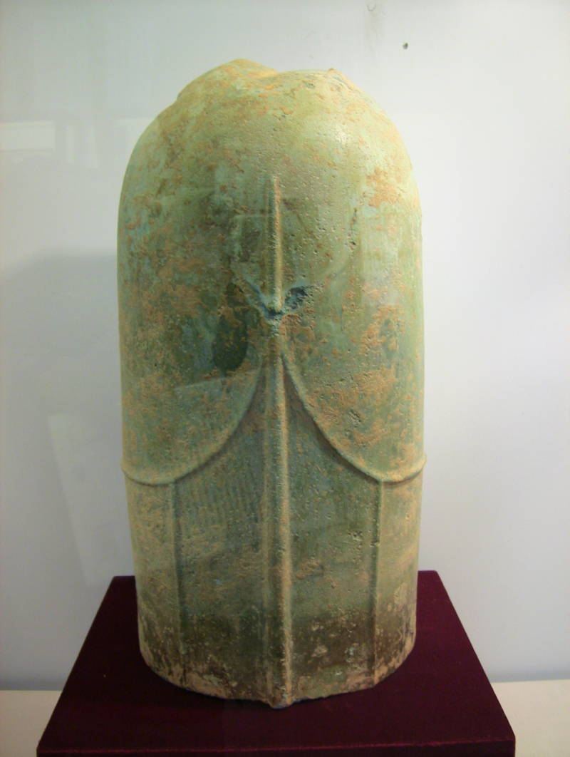 Linga đồng tìm thấy tại quần thể di chỉ khảo cổ Cát Tiên, Lâm Đồng. A copper linga found in Cát Tiên sanctuary.